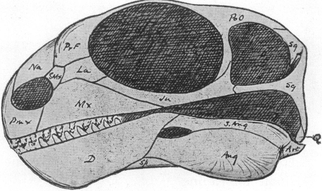 Galepus jouberti skull restoration, specimen 5541